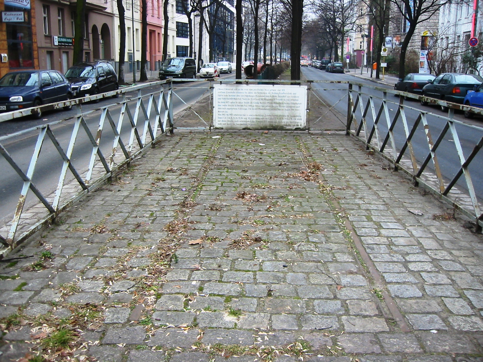 Berlin-Kreuzberg, Stresemannstraße: Südlich des Ida-Wolff-Platzes erinnert im Mittelstreifen der Straße ein im Kopfsteinpflaster verlaufendes Gleisstück an die Berliner Verbindungsbahn, die 1850/1851 als eine der ersten drei vom preußischen Staat selbst gebauten Eisenbahnstrecken die Berliner Kopfbahnhöfe miteinander verband. Sie führte vom Stettiner Bahnhof im Norden im großen Bogen westlich und südlich um das heutige Berlin-Mitte herum, überquerte westlich der späteren Oberbaumbrücke wieder die Spree und endete nahe beim heutigen Ostbahnhof.